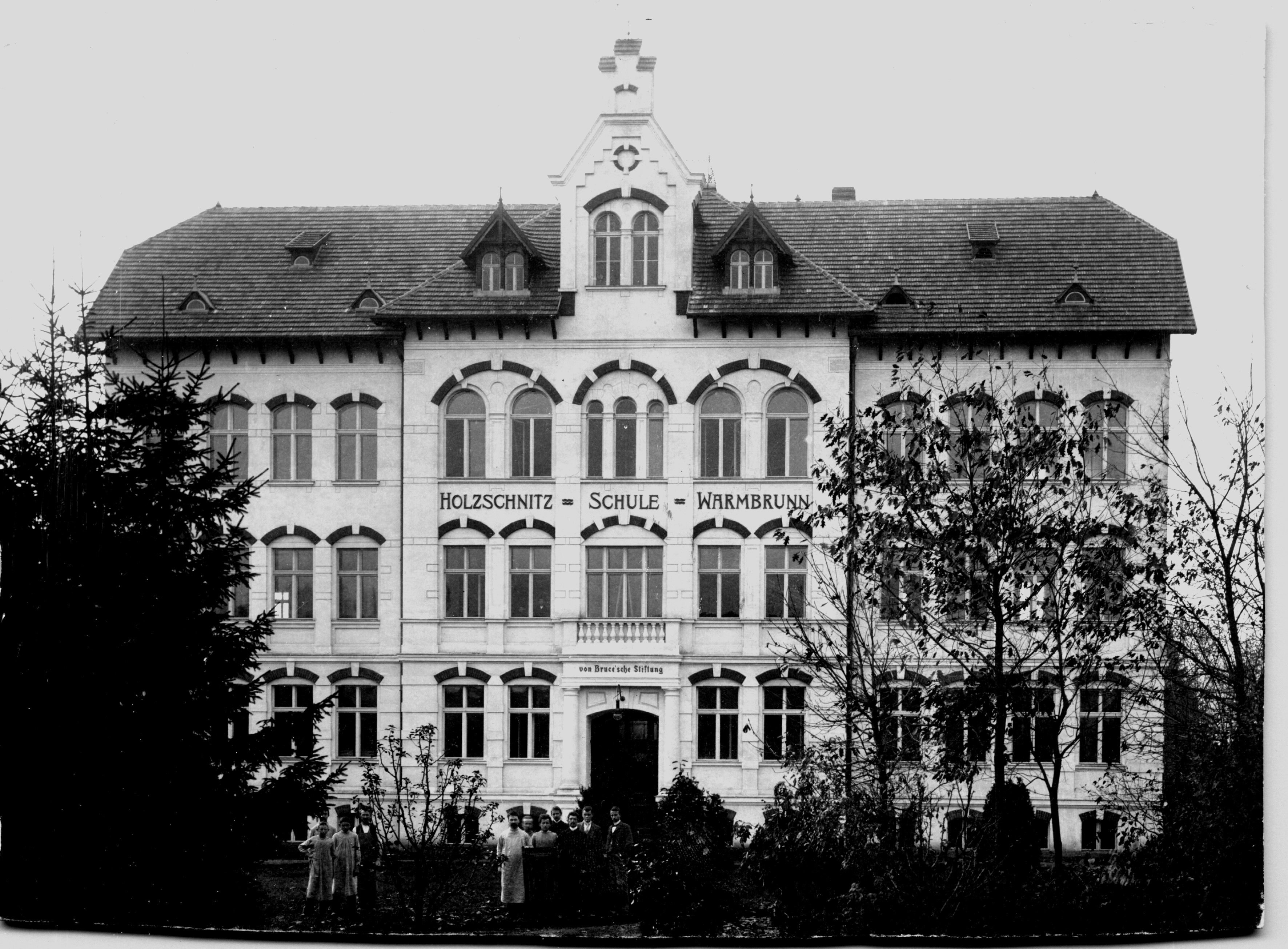 Holzschnitzschule in Bad Warmbrunn, Niederschlesien (Lower Silesia)